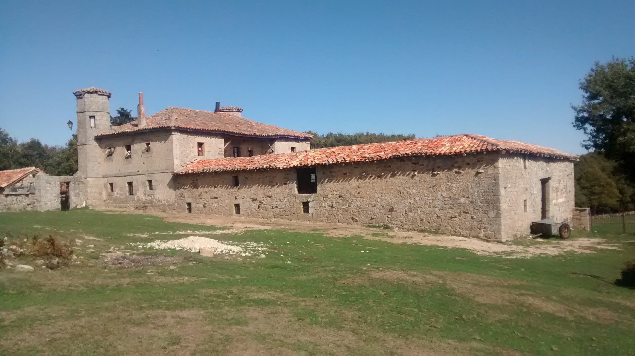 Cabaña de Hijedo, palacete de estilo regionalista de principios del siglo XX situado en un claro del monte Hijedo (Burgos, España).